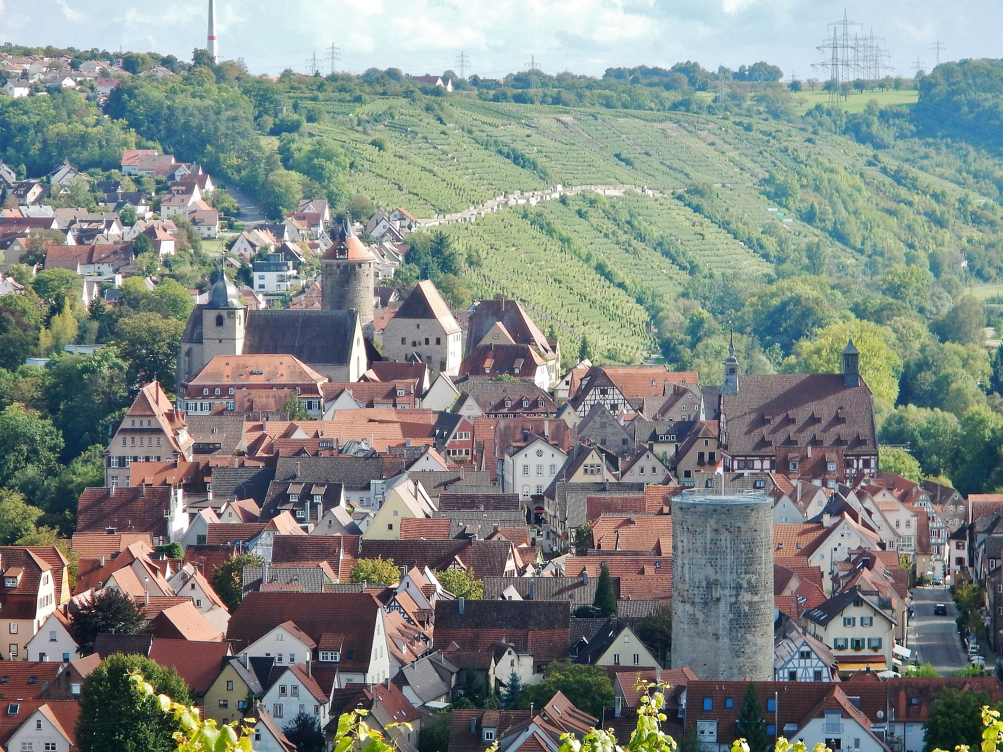 Blick über Besigheim nach Südsüdost